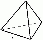 Наглядное пособие по вычислению объема тетраэдра.